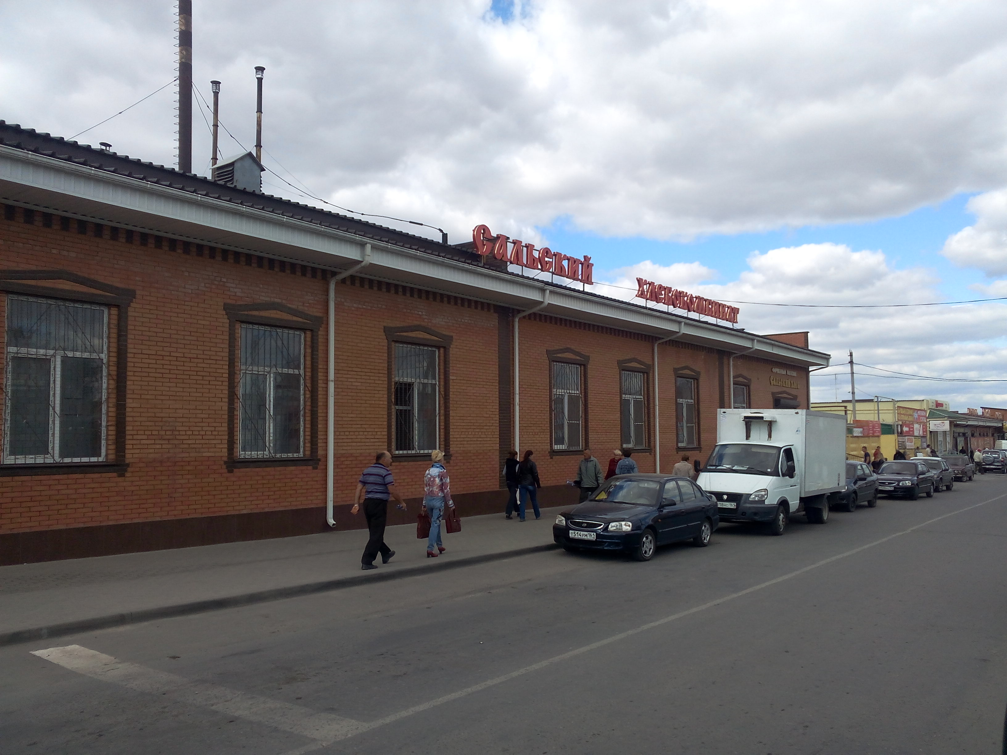 г. Сальск, ул. Коломийцева, здание хлебокомбината